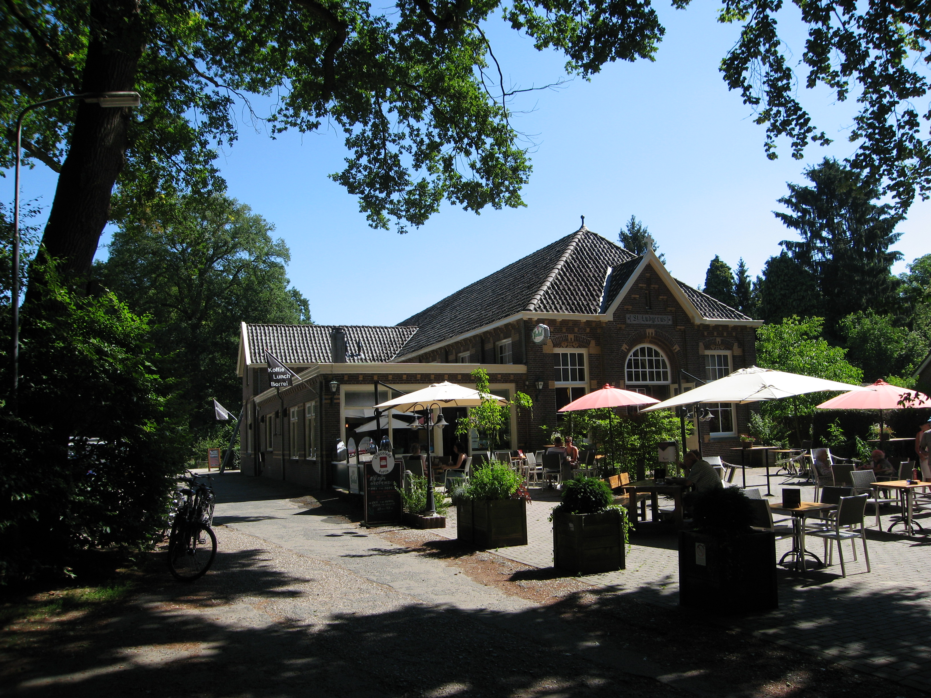 Verenigingsgebouw, bouwjaar ca. 1900, gemeentelijk monument sinds 7-4-1998